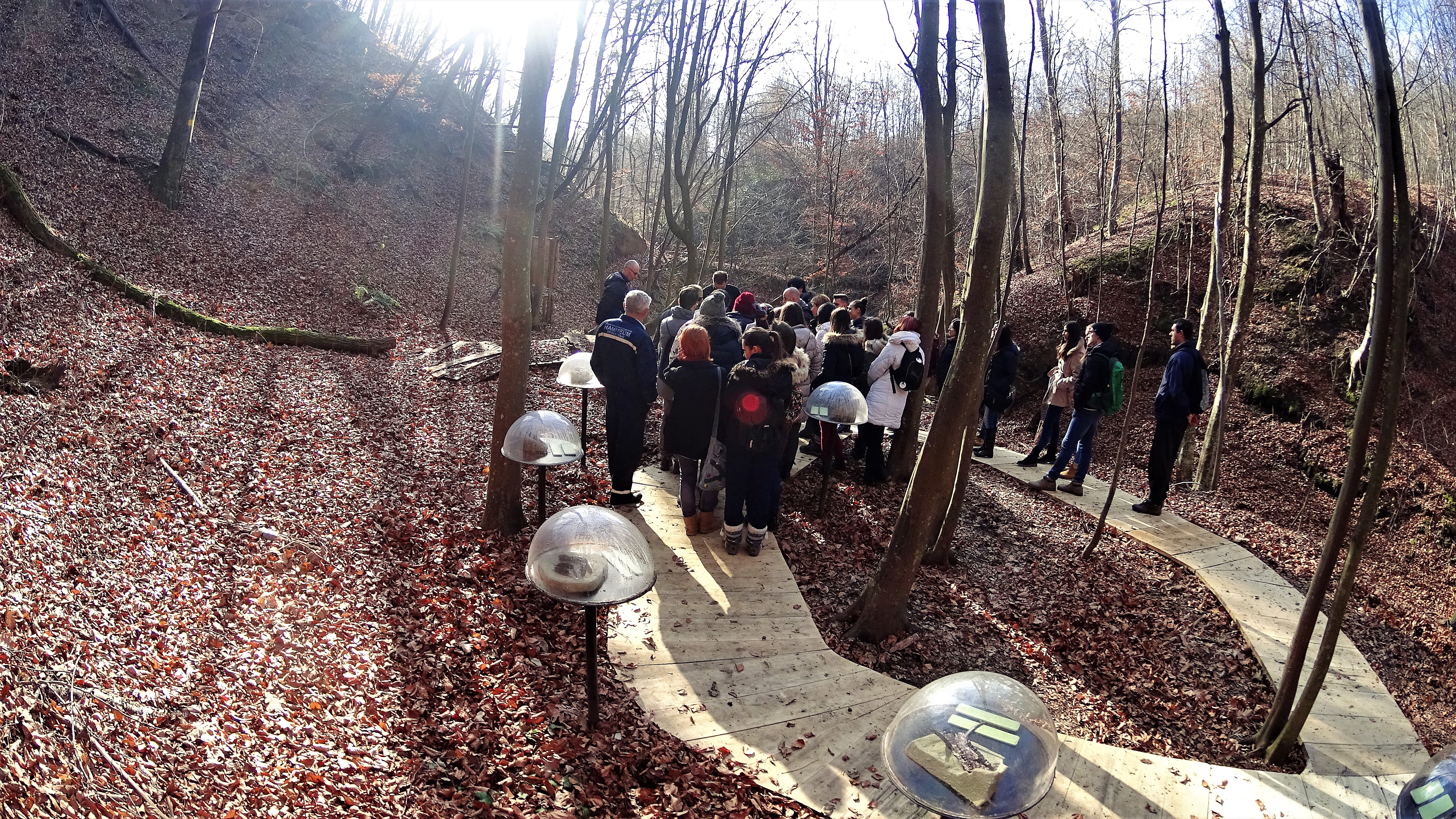 Српски (ћирилица): Ово је фотографија заштићеног природног добра у Србији под шифром: СП241 This is a a photo of a natural area in Serbia with ID: СП241 Палеонтолошки локалитет, Споменик природе Пребреза